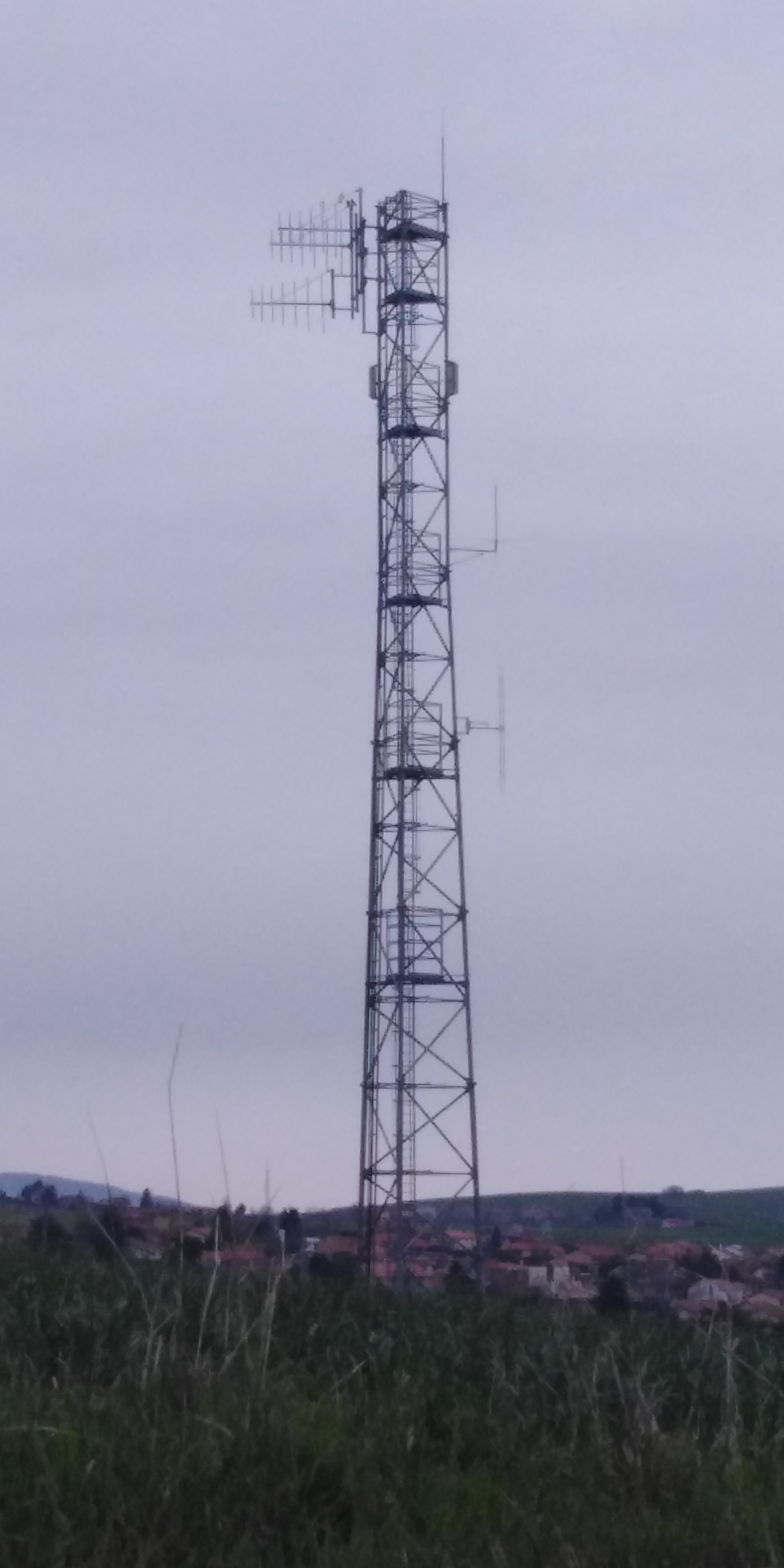 Pylône accueillant les relais pour les communications entre agents autoroutiers et la radio autoroutière Radio Vinci Autoroutes sur 107.7 FM.